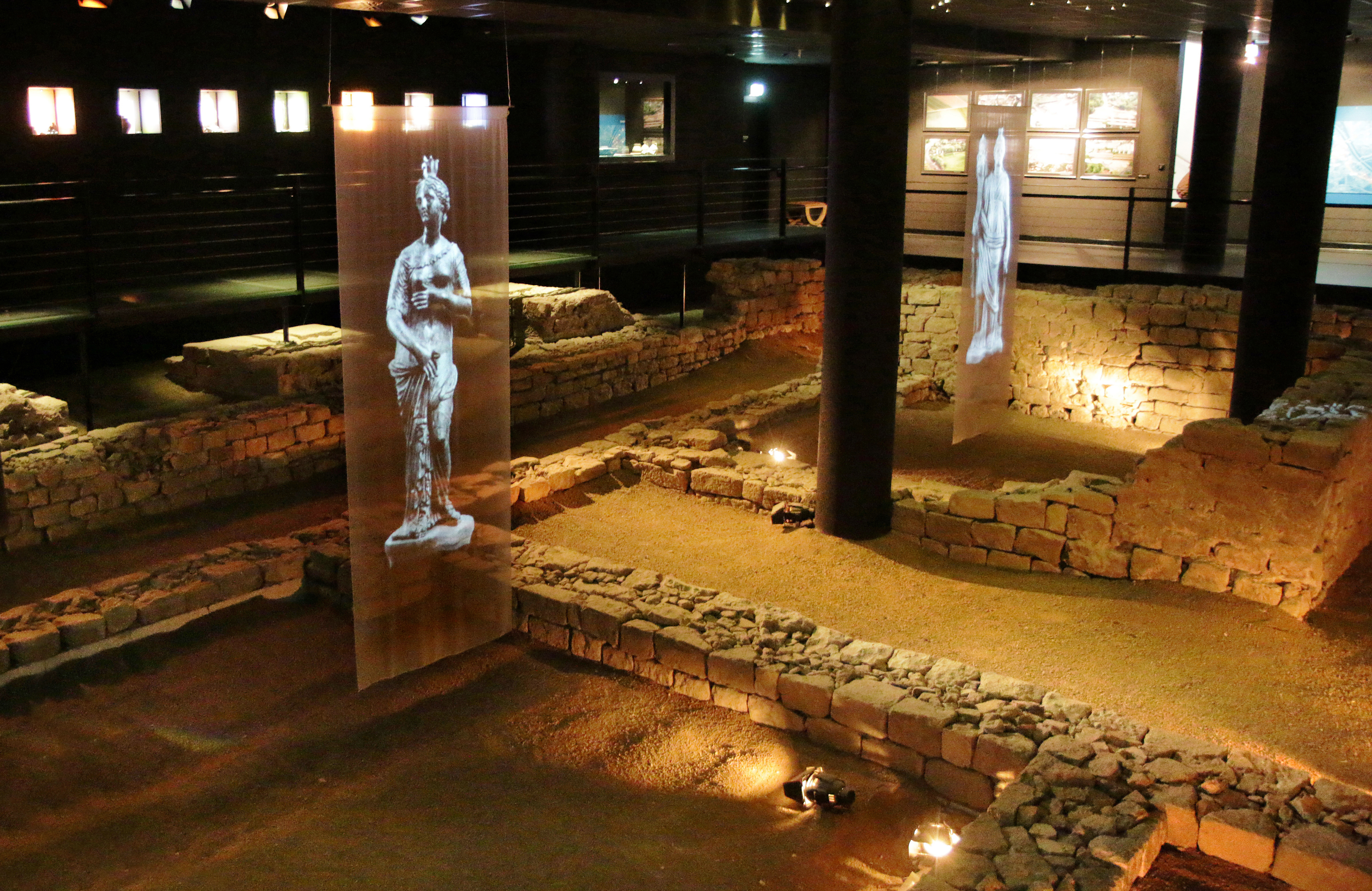 Bauliche Überreste des Heiligtums. Bildhintergrund Altarsockel, Bildmitte Zentraler Gang (Taberna archaeologica, Mainz)